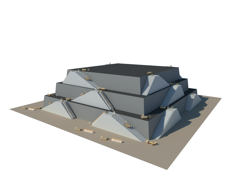 Bau des Kernmauerwerks mittels Tangentialrampen